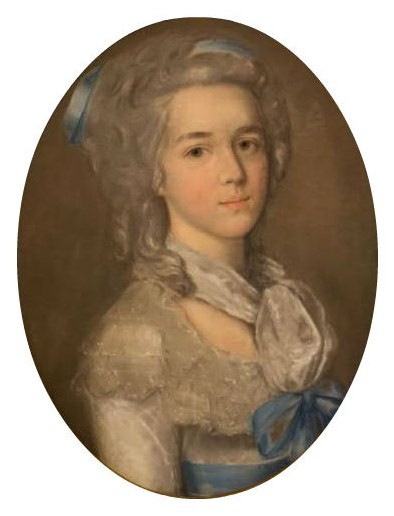 Елизавета Алексеевна Голохвастова, ур. Яковлева (1763—1822), жена Павла Ивановича Голохвастова (ум. 1818)